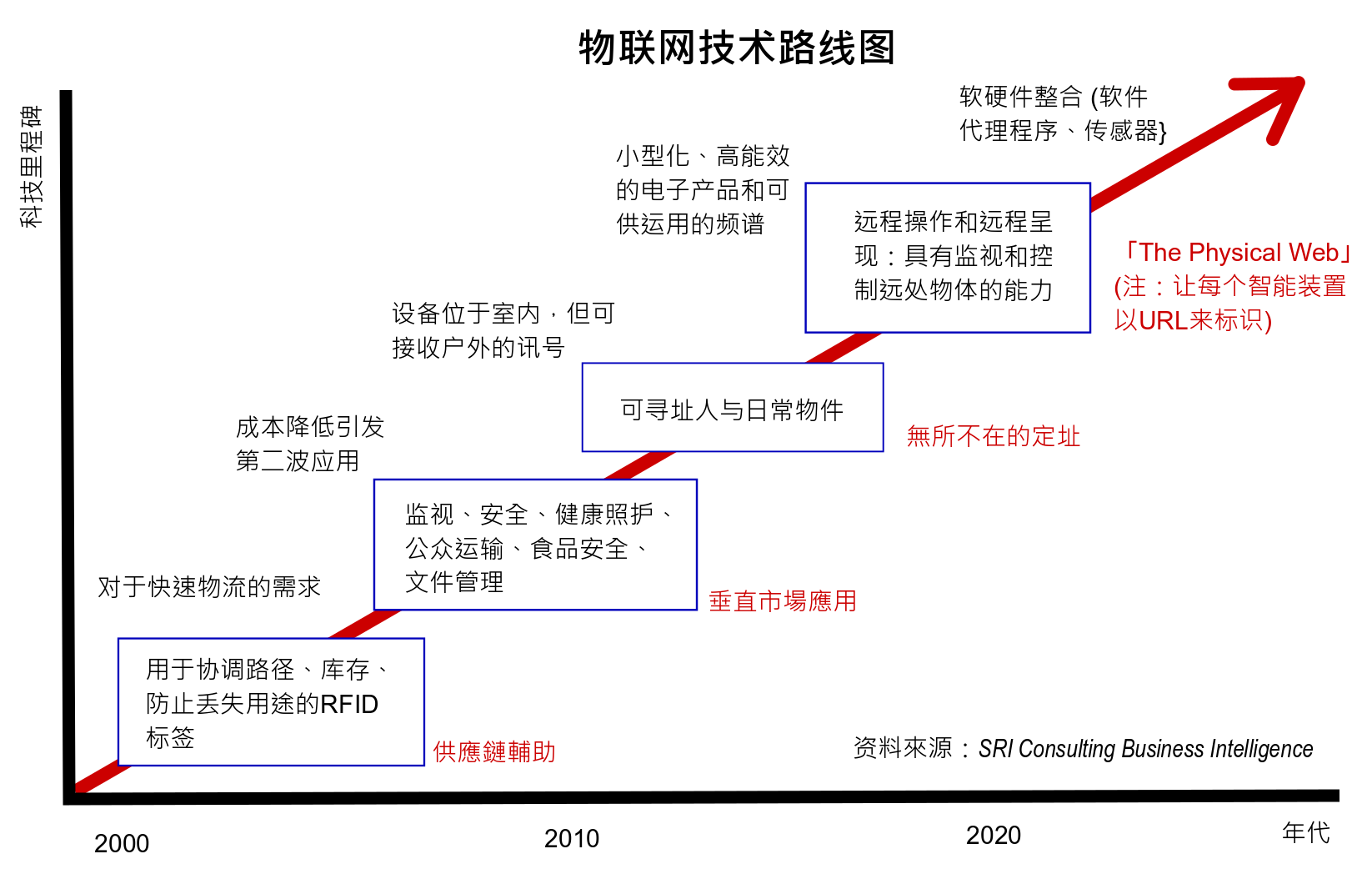 中文（台灣）: 图形由本人绘制，档案以 为来源进行小幅调整